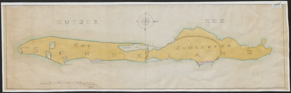 Situatiekaarten van Schokland, met daarop aangegeven de te verbeteren zeeweringen. 3 bladen, waarvan nr. 14659 een deel van het eiland weergeeft. Vgl. Landdagstukken, februari 1789, punt 69 en resolutie van de staten van Friesland van 27-2-1792.